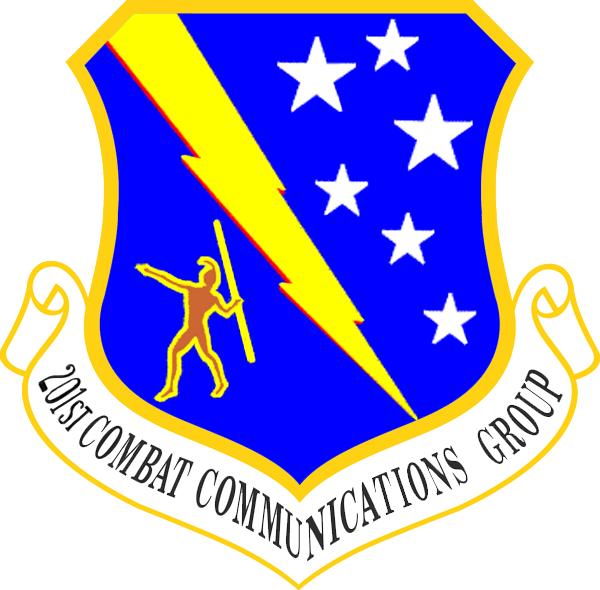 201st Combat Communications Group emblem